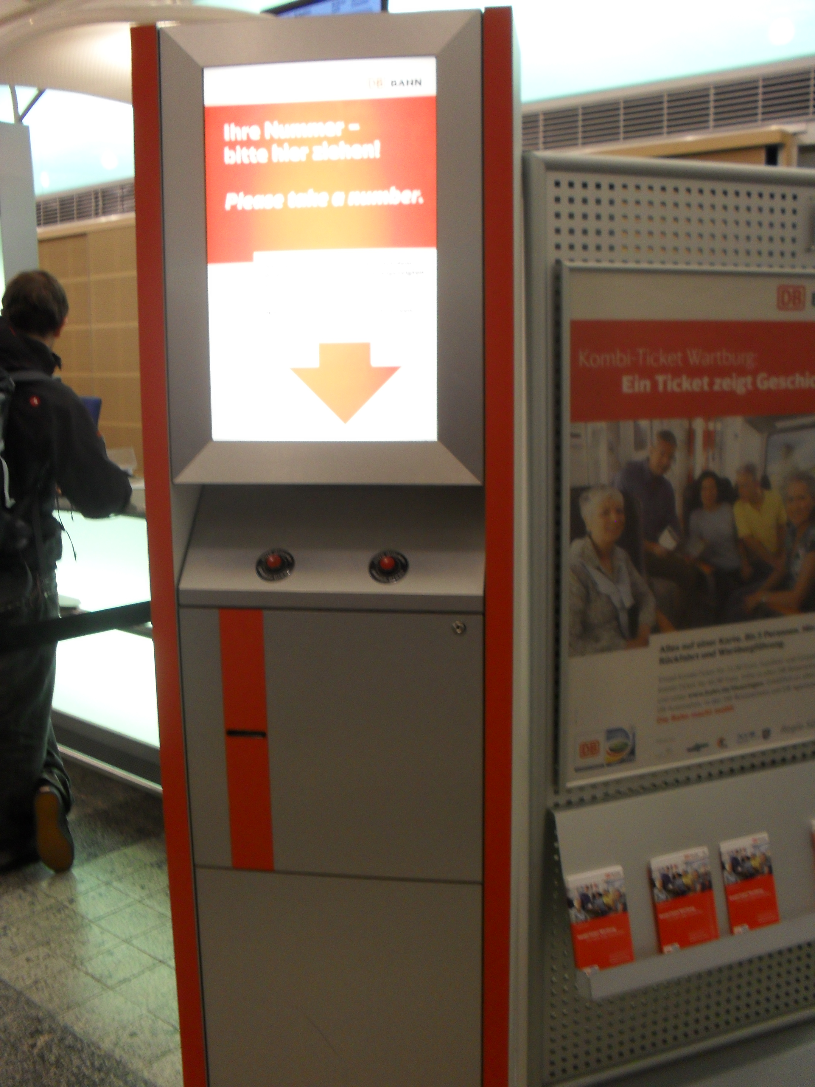 Kundenwegweiser